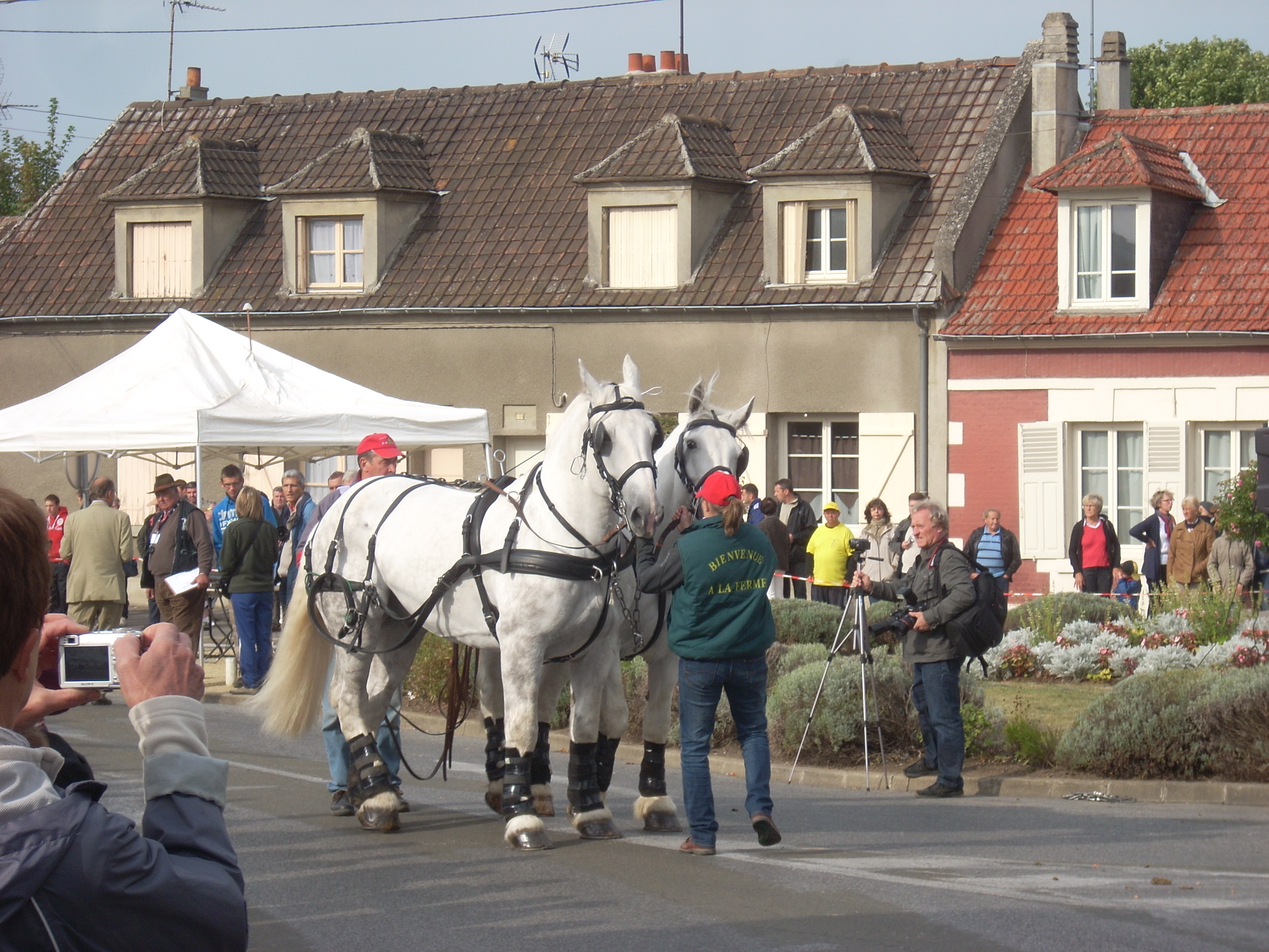 Paire de Percherons attelés durant la route du Poisson 2012, à Lacroix-Saint-Ouen, équipe "Bienvenue à la Ferme"